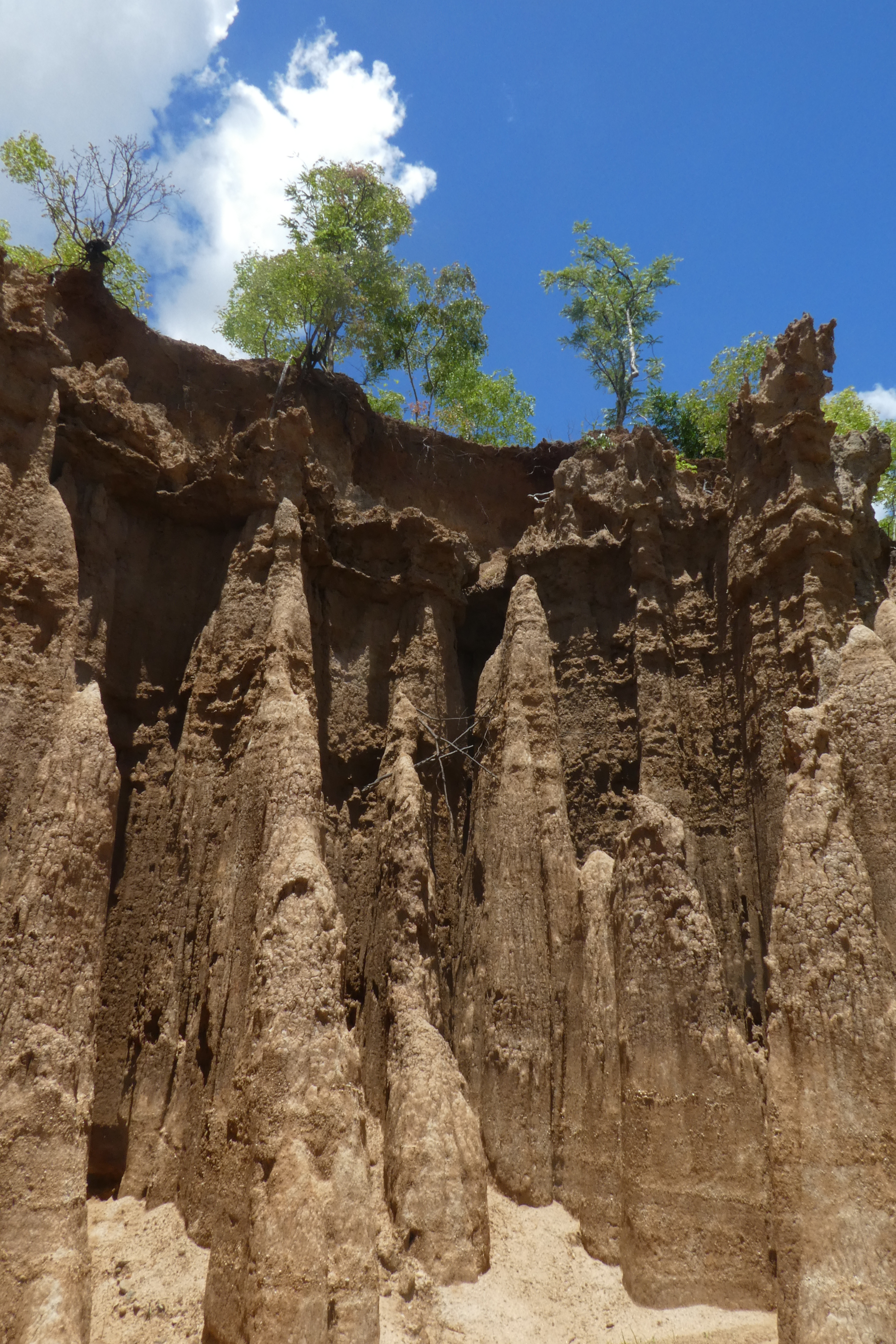 Chikala Pillars in Machinga, Malawi (Thanks to R's lens)